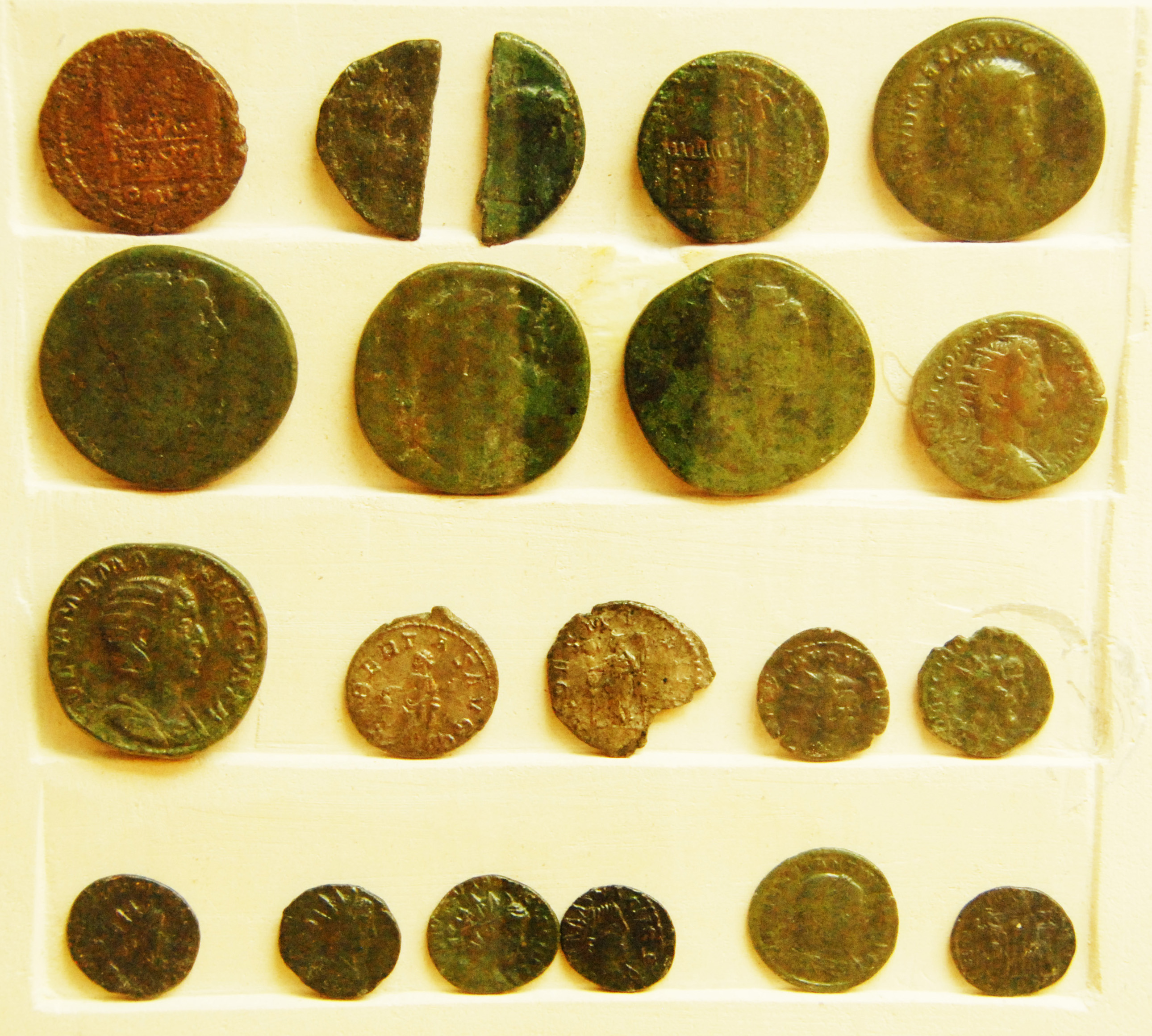 Civaux, Museum, Kupfer- u. Silbermünzen